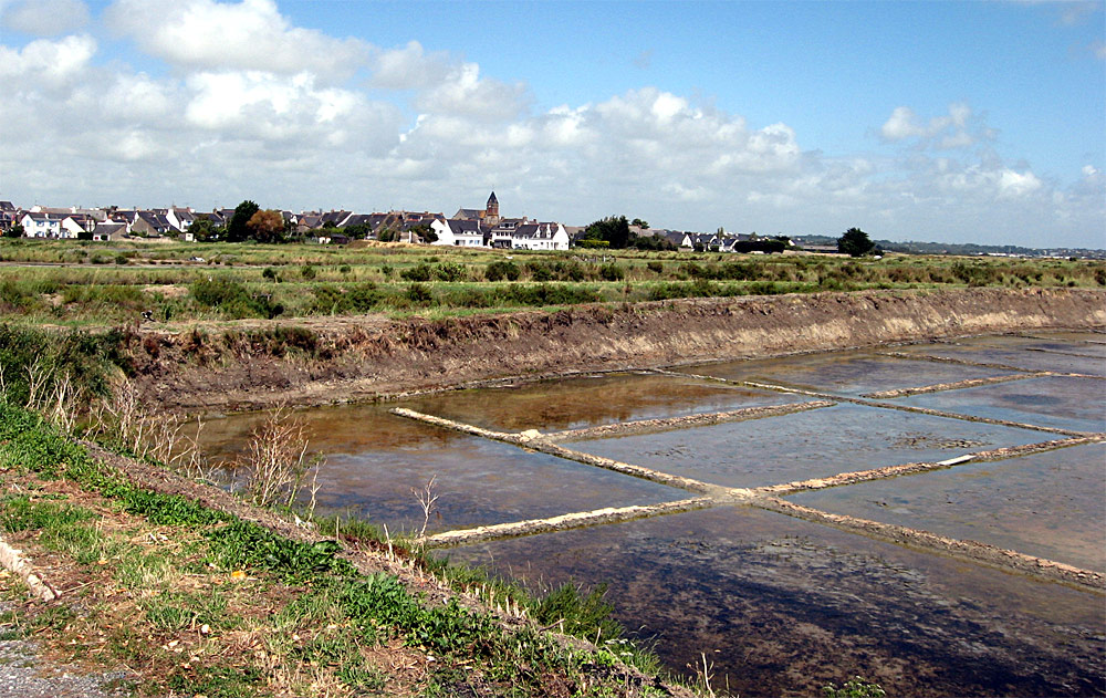 Zoutbekkens bij Batz-sur-Mer